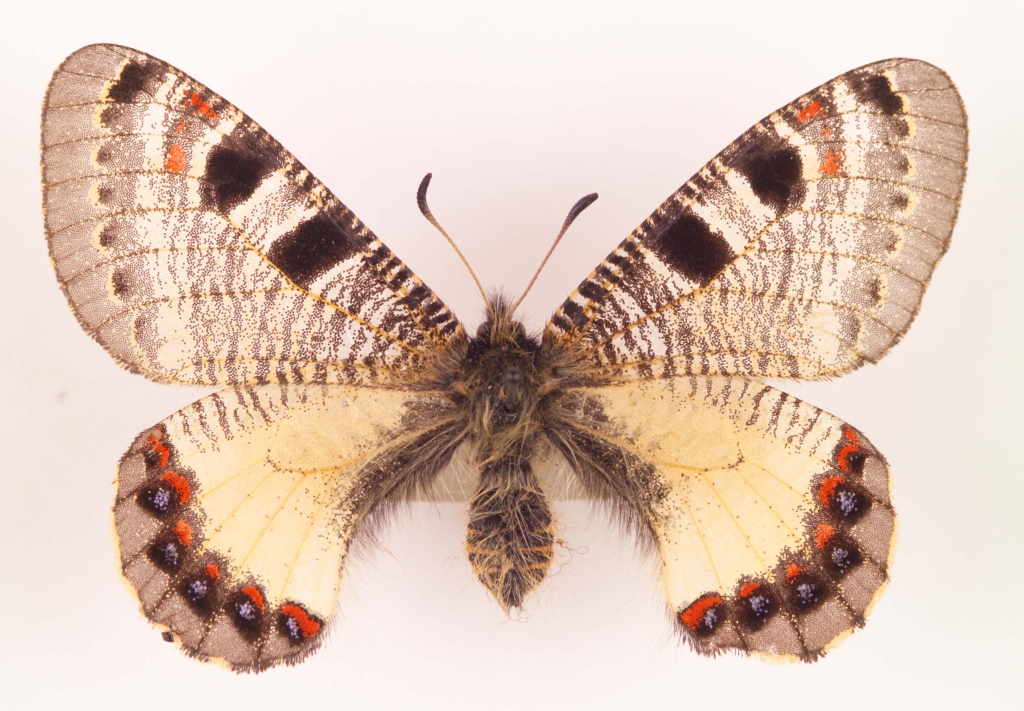 Archon apollinus Herbst, 1780 Female Beirut, Lebanon